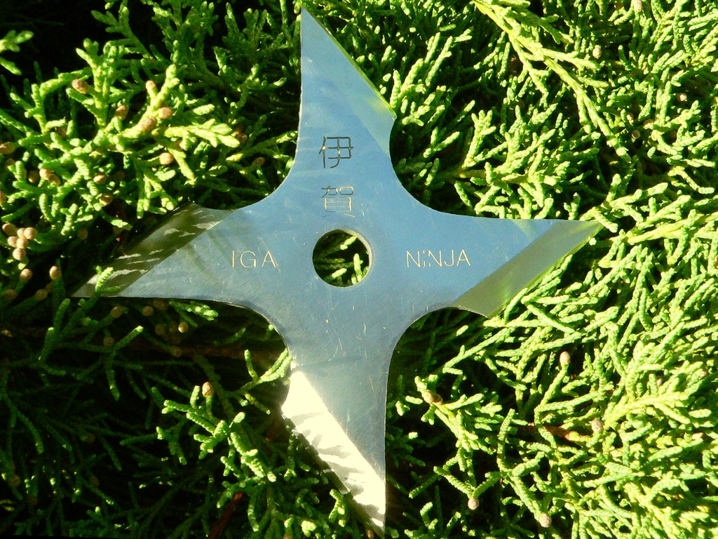 a super arma chama-se shuriken